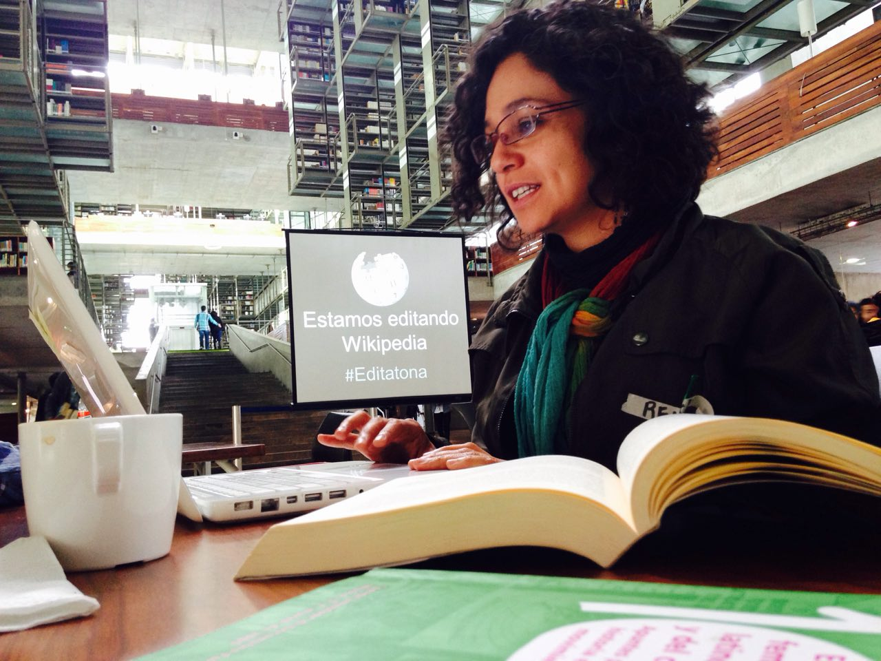 Segunda edición de la Editatona, en la Biblioteca Vasconcelos, Ciudad de México.